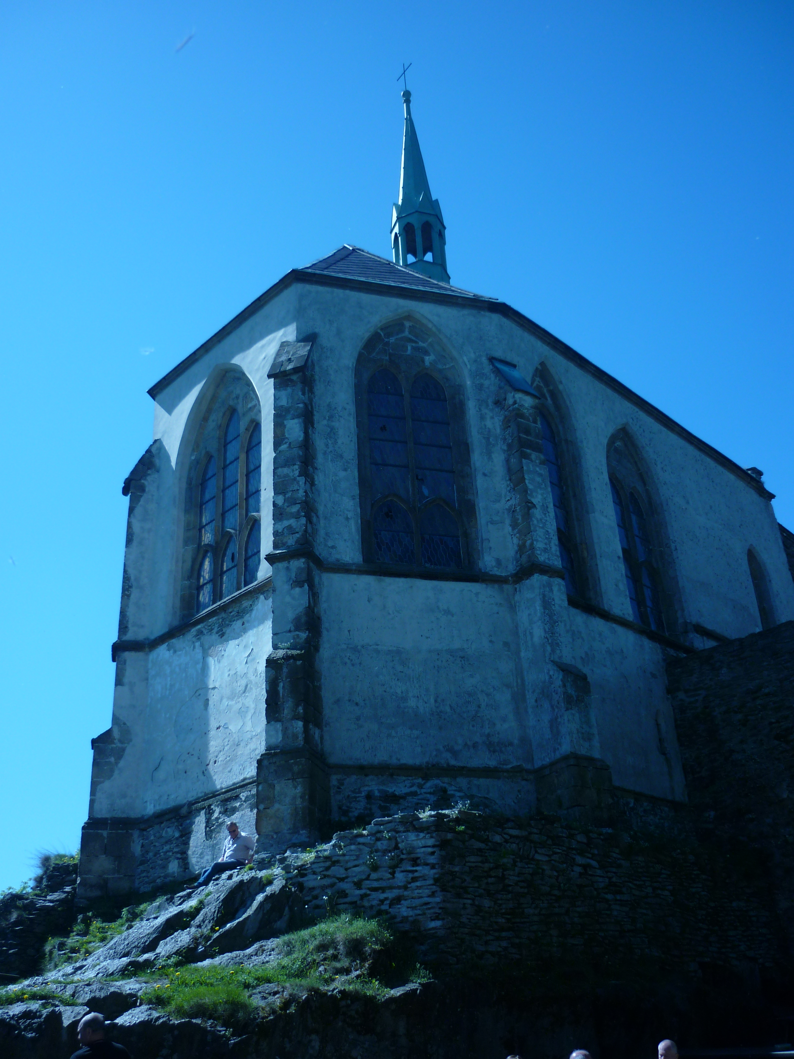 Bezdězská kaple